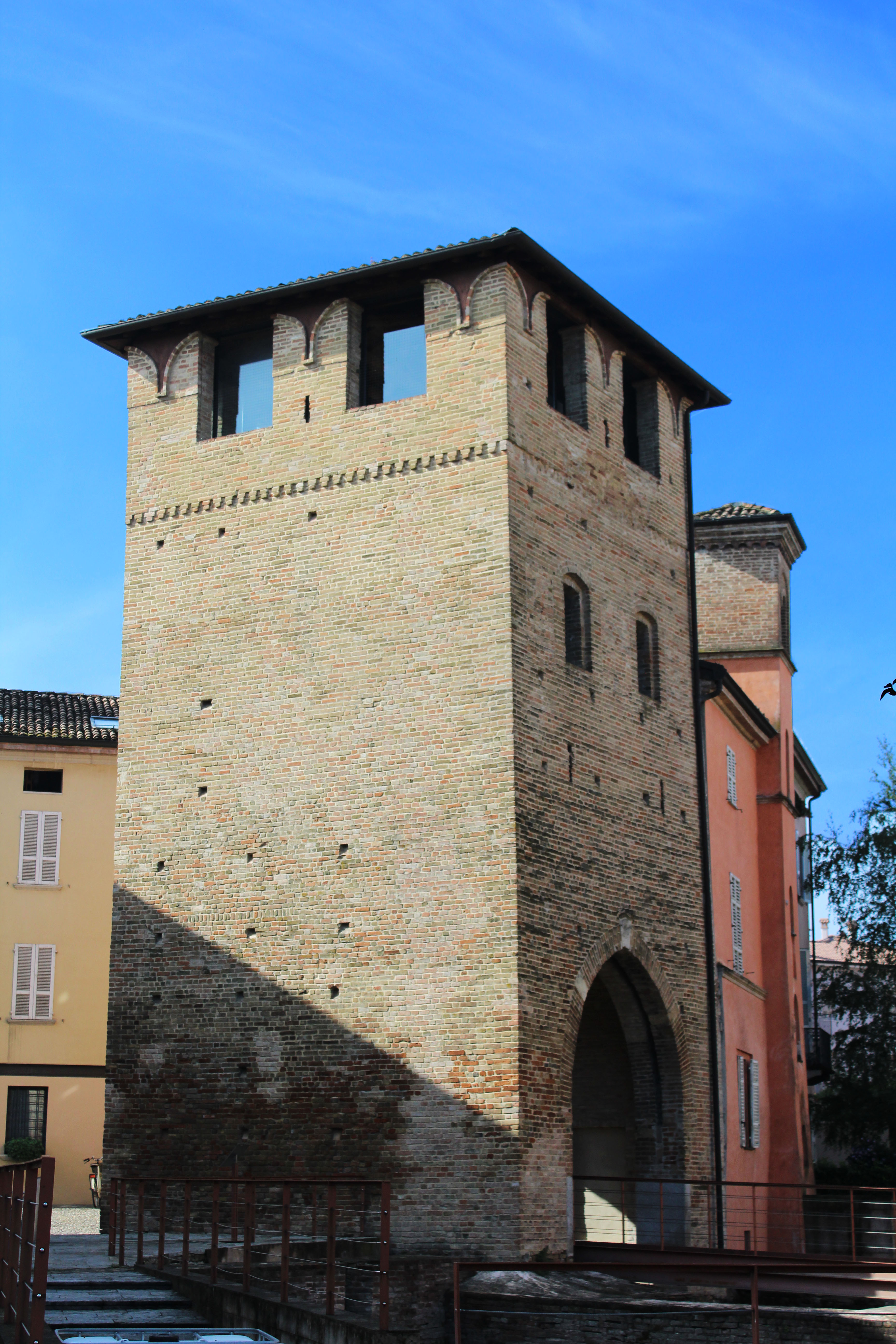 Torre medievale This is a photo of a monument which is part of cultural heritage of Italy.